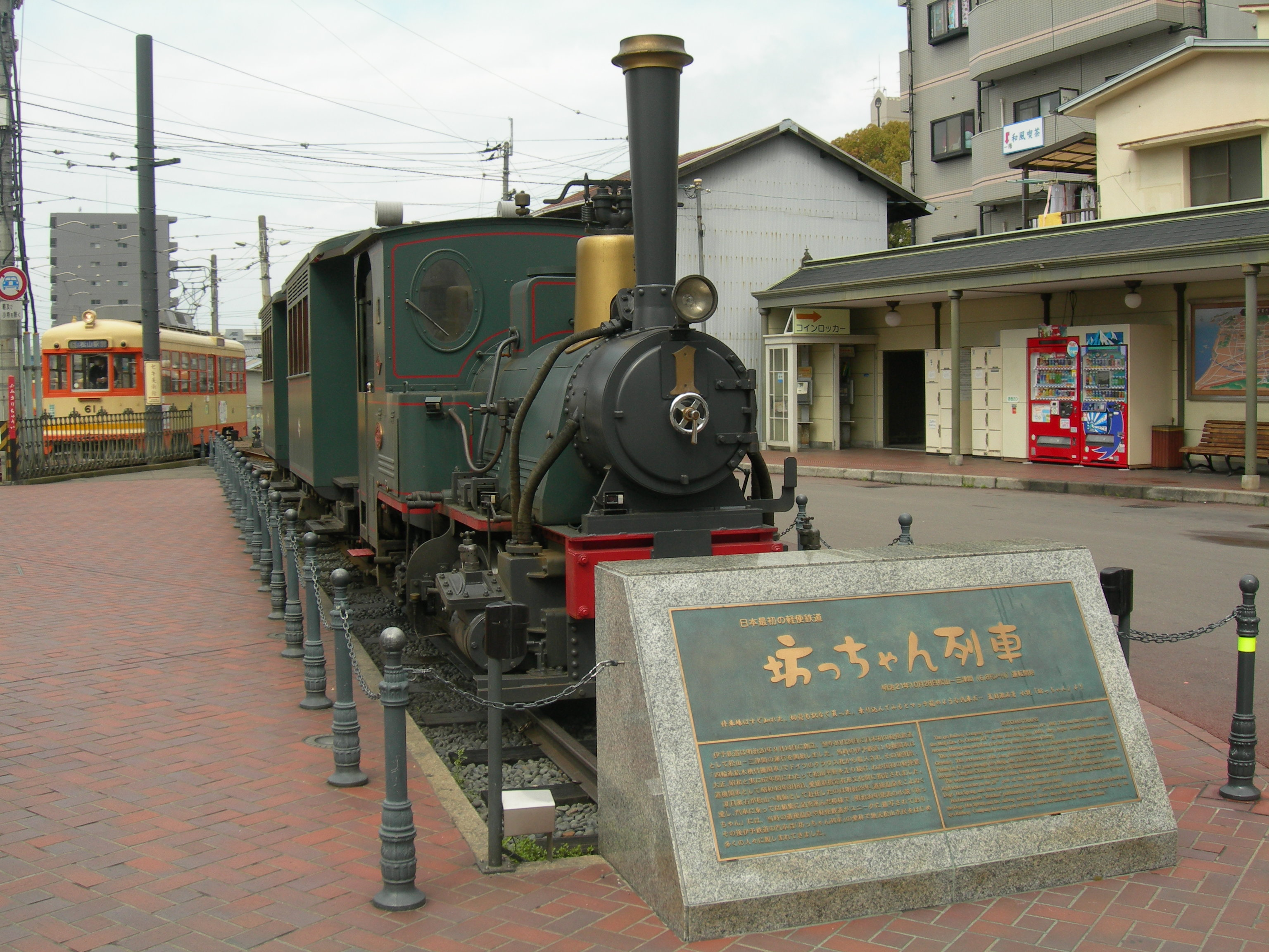 伊予鉄道坊っちゃん列車 D1形